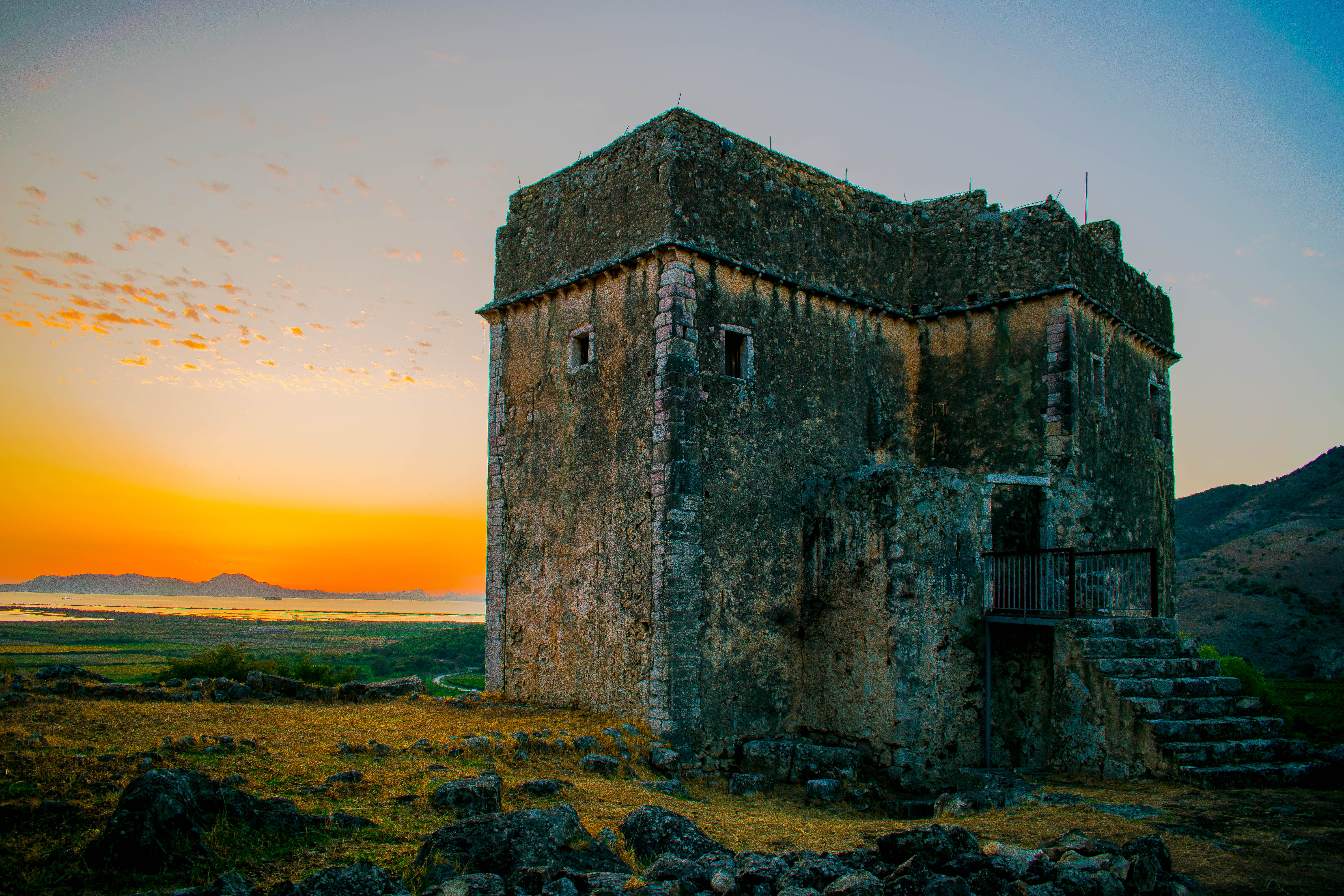 Πύργος Ραγίου«Πύργος Ραγίου»